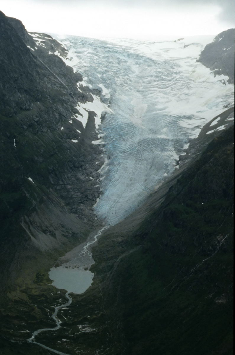 Bødalsbreen